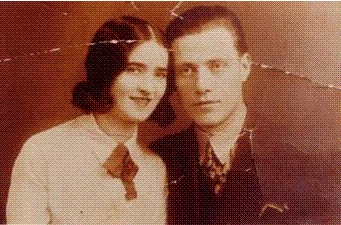 ייִדיש: מענדל